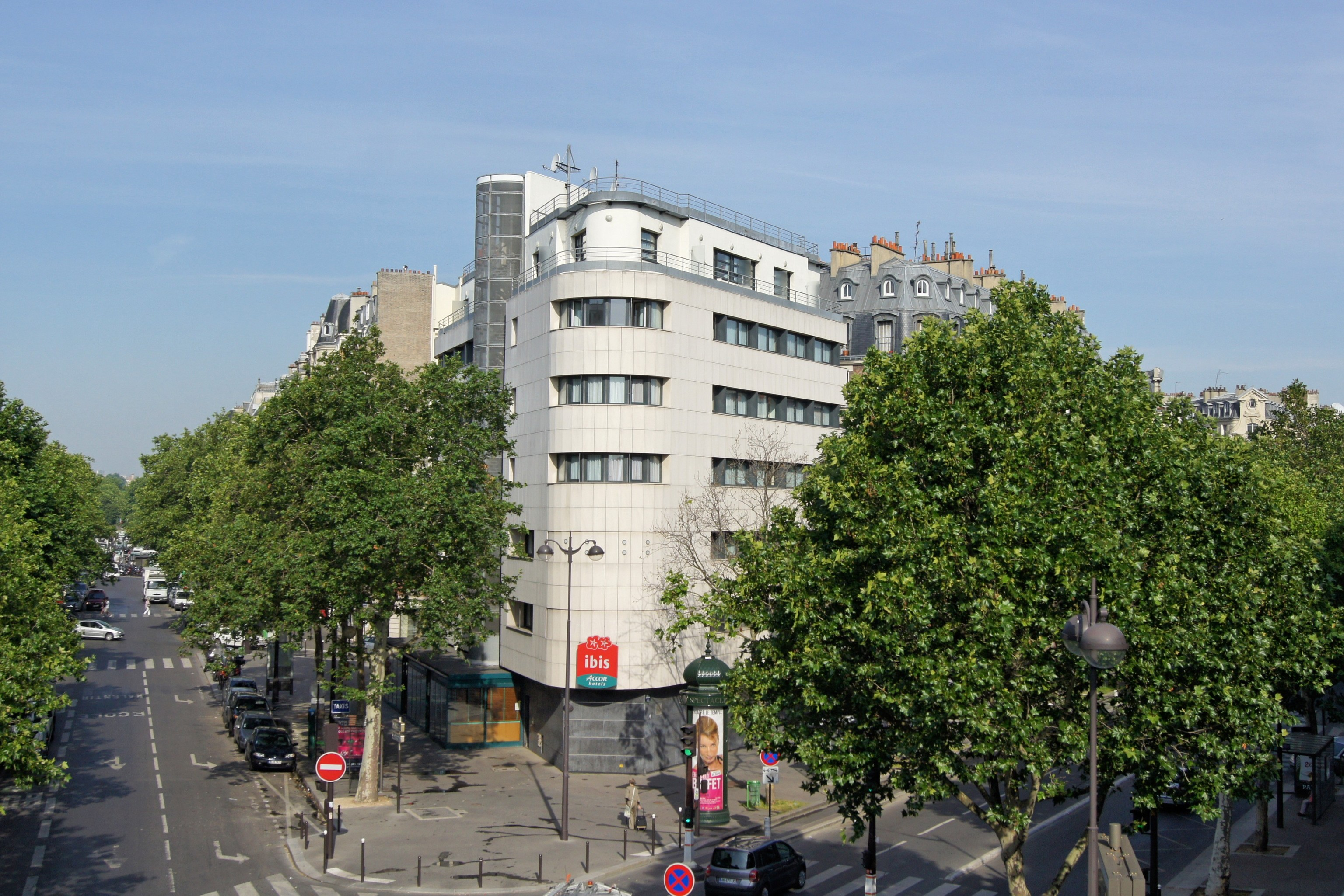 Hotel ibis Paris Gare de Lyon Ledru Rollin.